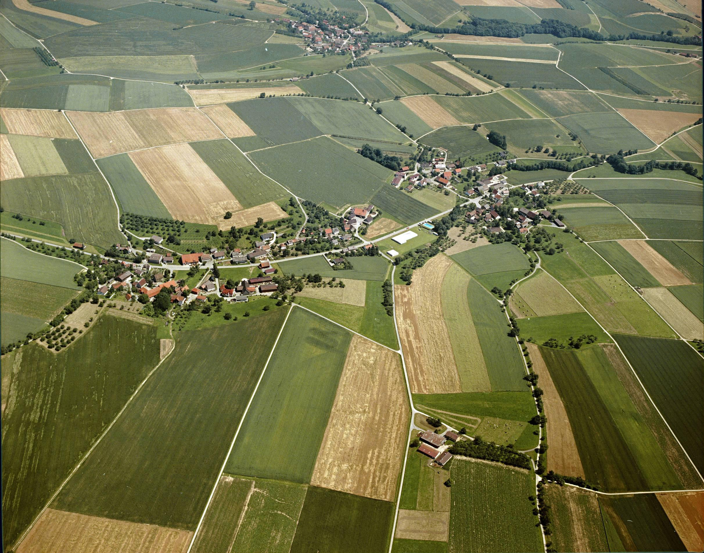 Luftbild von Westernbach - Staatsarchiv Sigmaringen - Archivalieneinheit N 1/96 T 1 Nr. 652